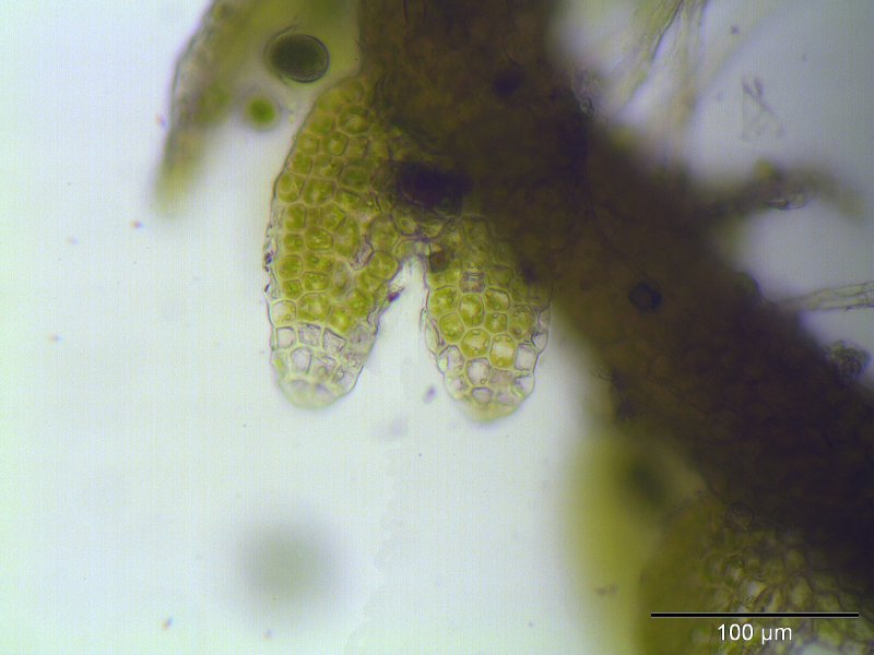 Spreizblättriges Kleinkopfsprossmoos (Cephaloziella divaricata), Flankenblatt, Vergrößerung: 250x